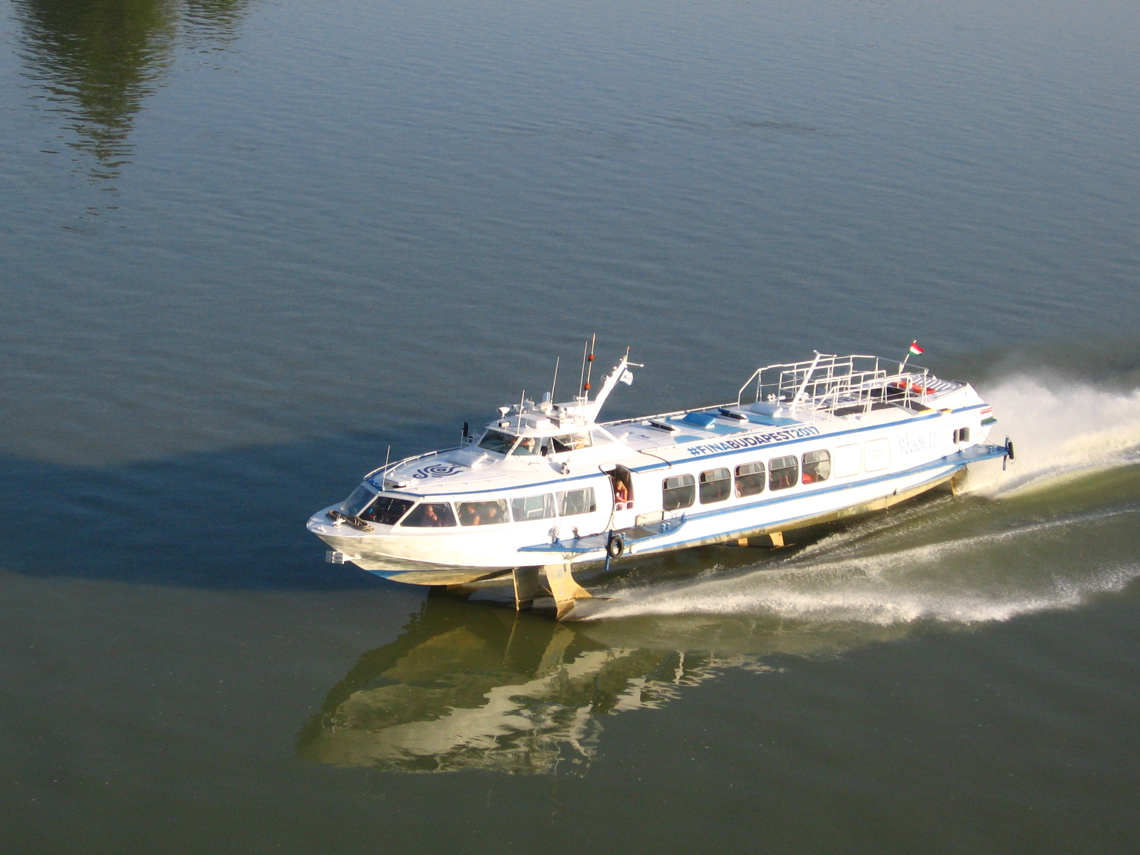 Loď Vöcsök III v Ostřihomi ve směru do Budapešti.